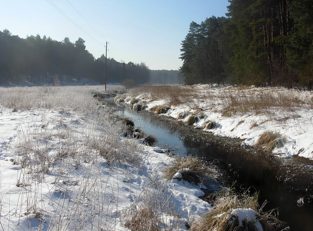 Struga Młyńska – dopływ Kanału Bydgoskiego w dolinie Podprądy na granicy gminy Białe Błota i osiedla Miedzy w Bydgoszczy